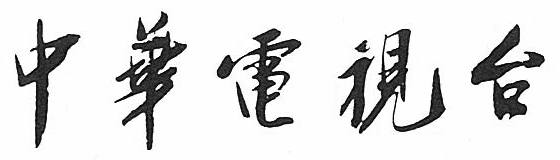 中華電視公司前身「中華電視台」的中文楷書標準字，擷取自蔣中正墨跡。